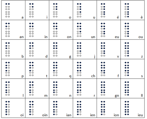 La sonografia de Charles Barbier adaptado para discapacitados visuales